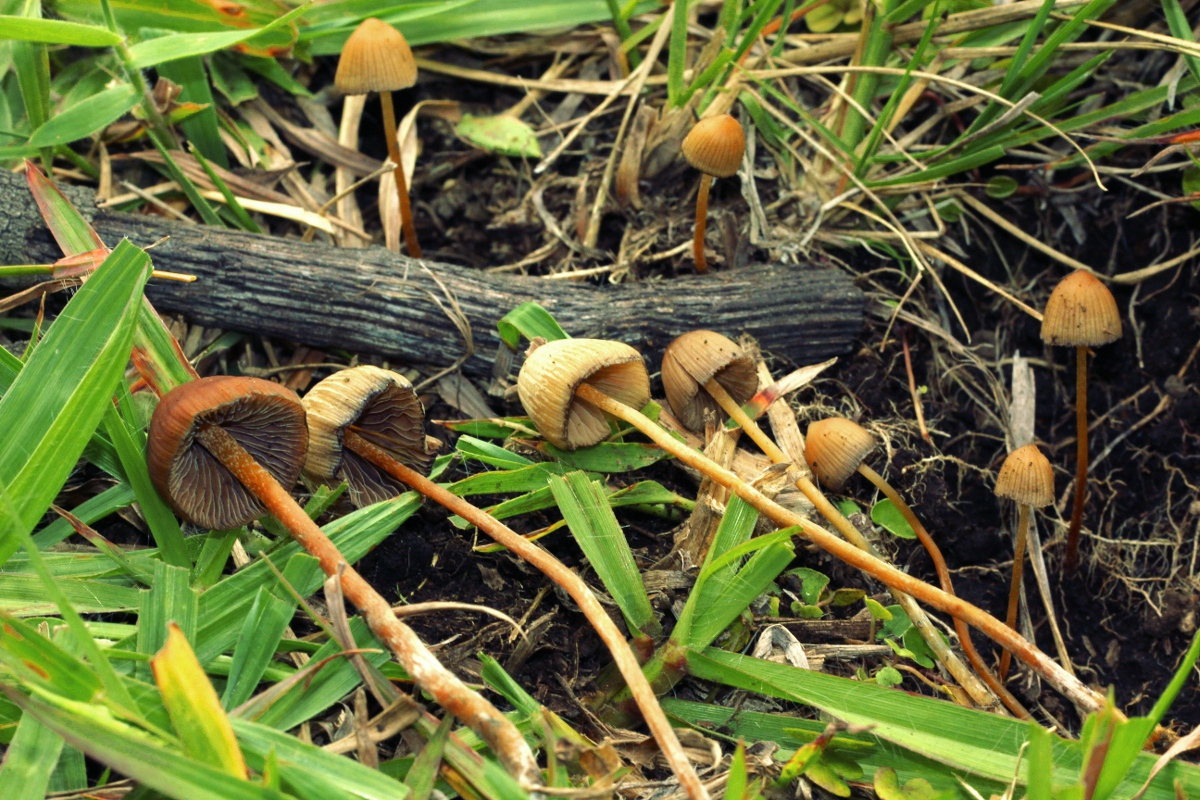 Psilocybe mexicana R. Heim